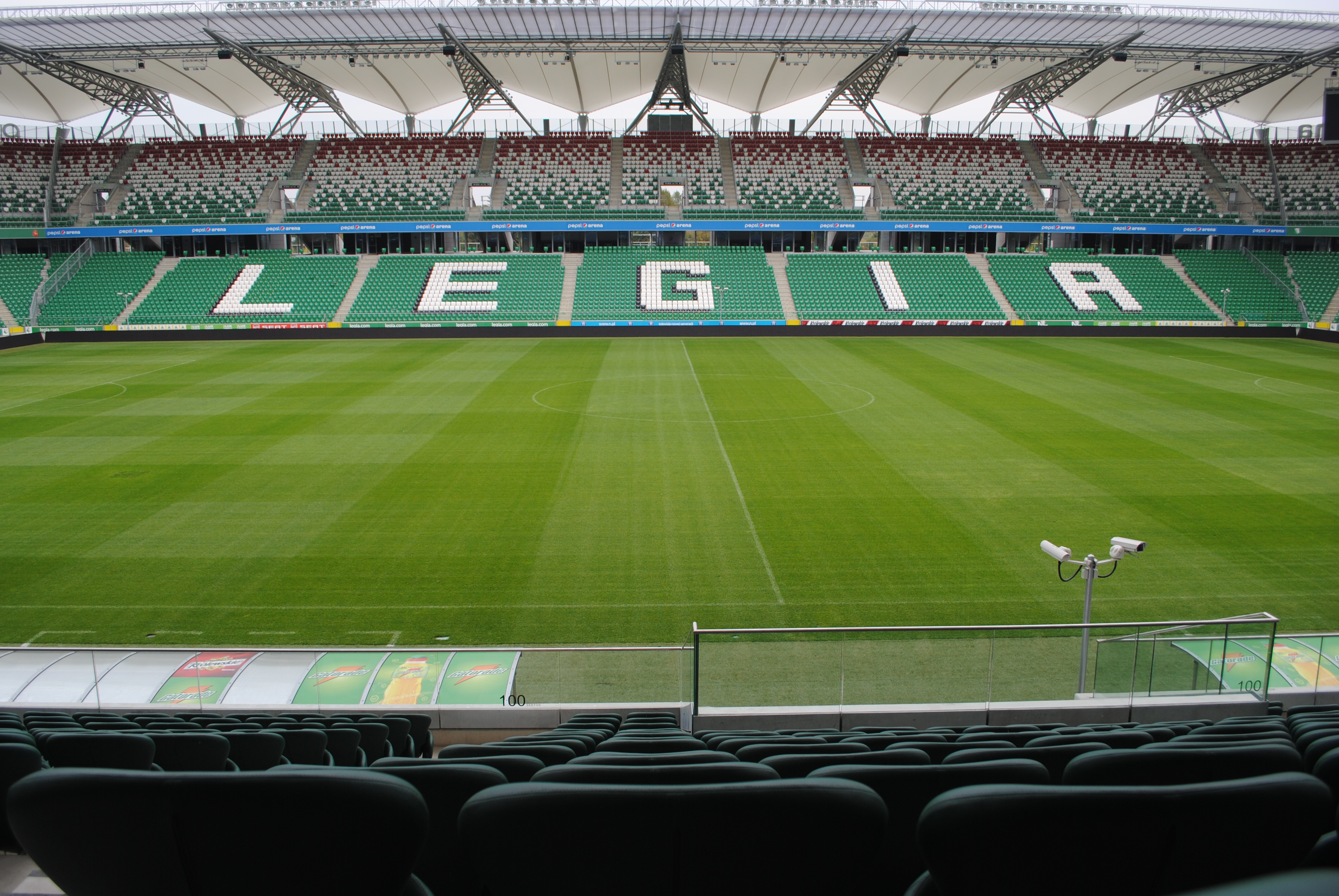 Stadion Legii Warszawa